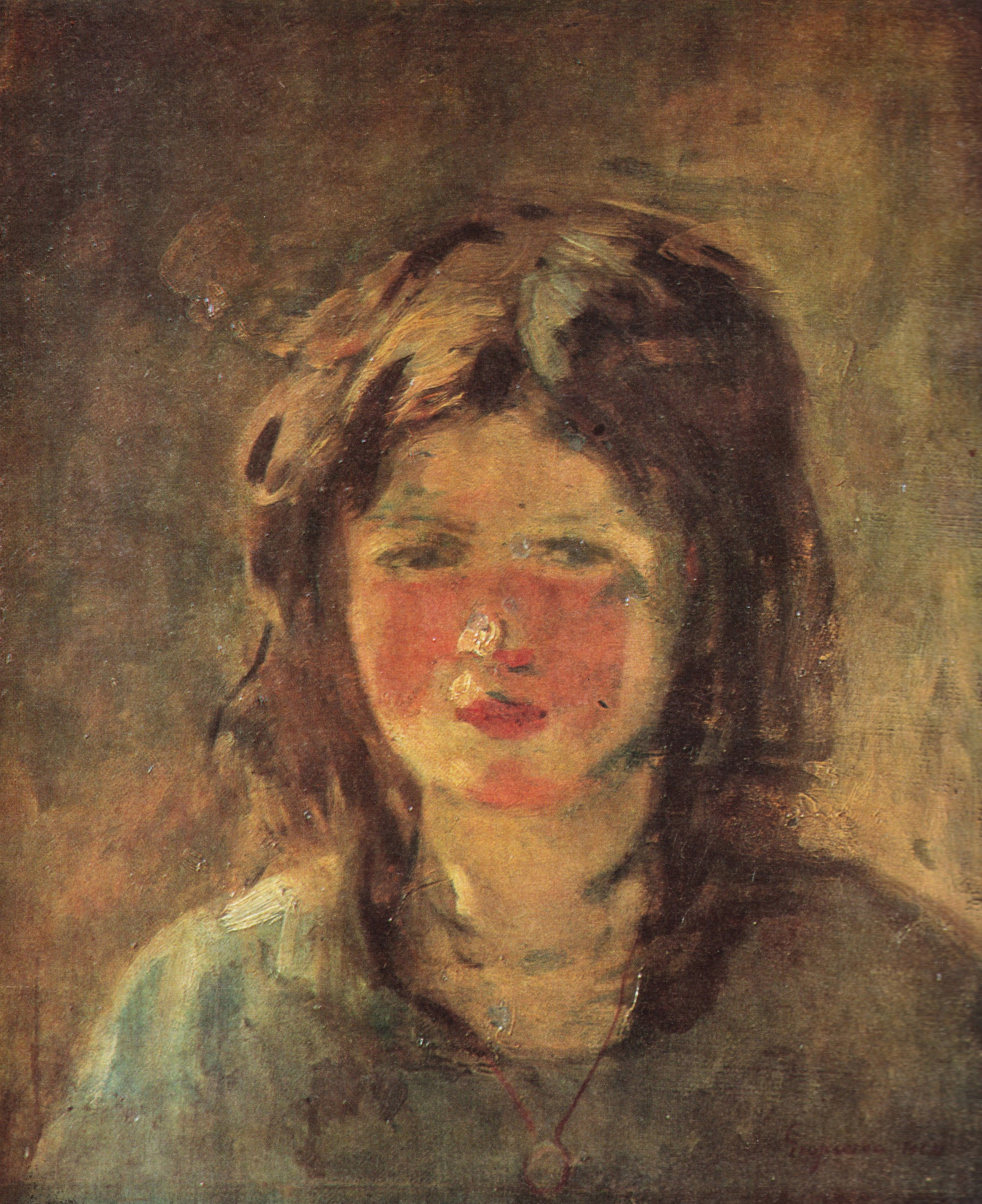 Elena Davila, ulei/pânză, 40,5x50cm, semnat și datat - Muzeul Nicolae Grigorescu din Câmpina